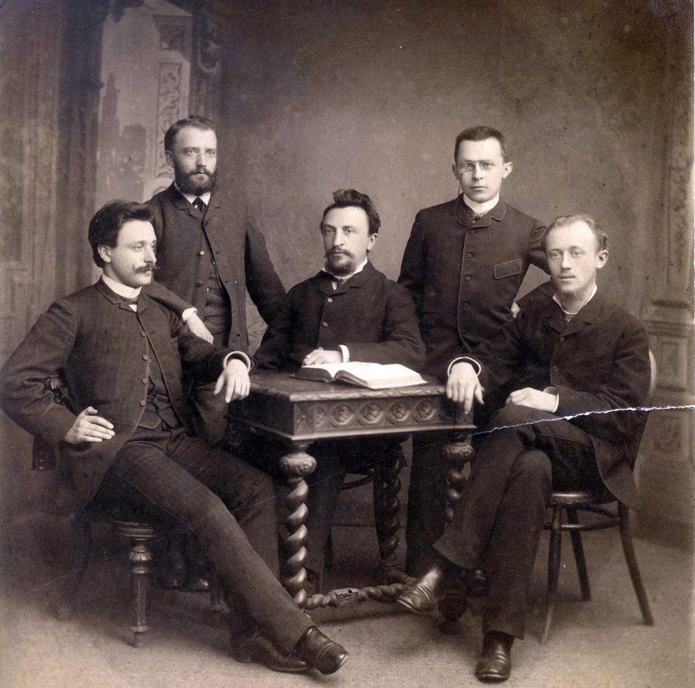 Professor Erasmus Kittler, Lehrstuhl für Elektrotechnik an der Technischen Hochschule Darmstadt, und Mitarbeiter. Rechts Michail Ossipowitsch Doliwo-Dobrowolski als Student in Darmstadt